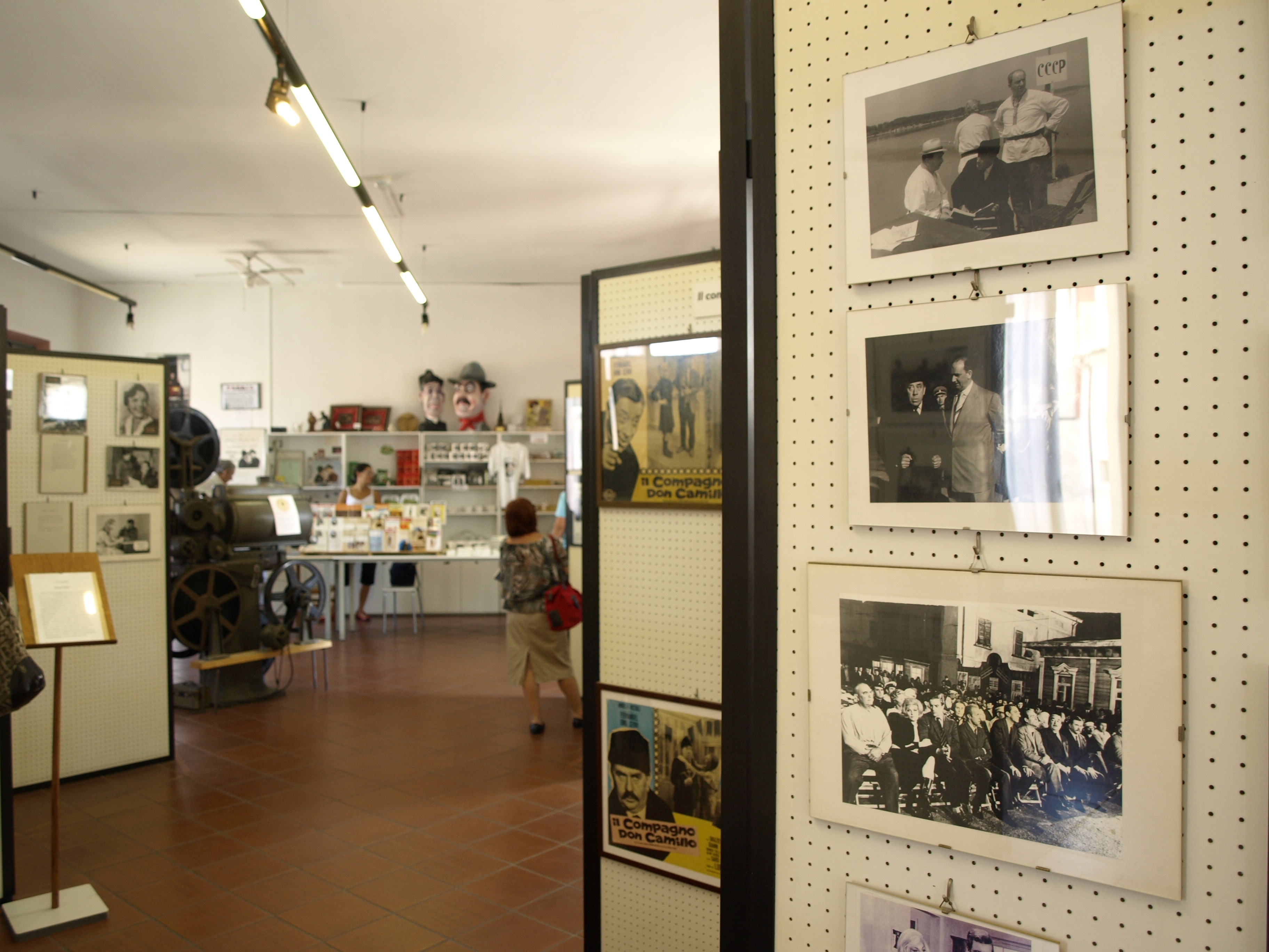 nel museo dei reperti cinematografici dei films